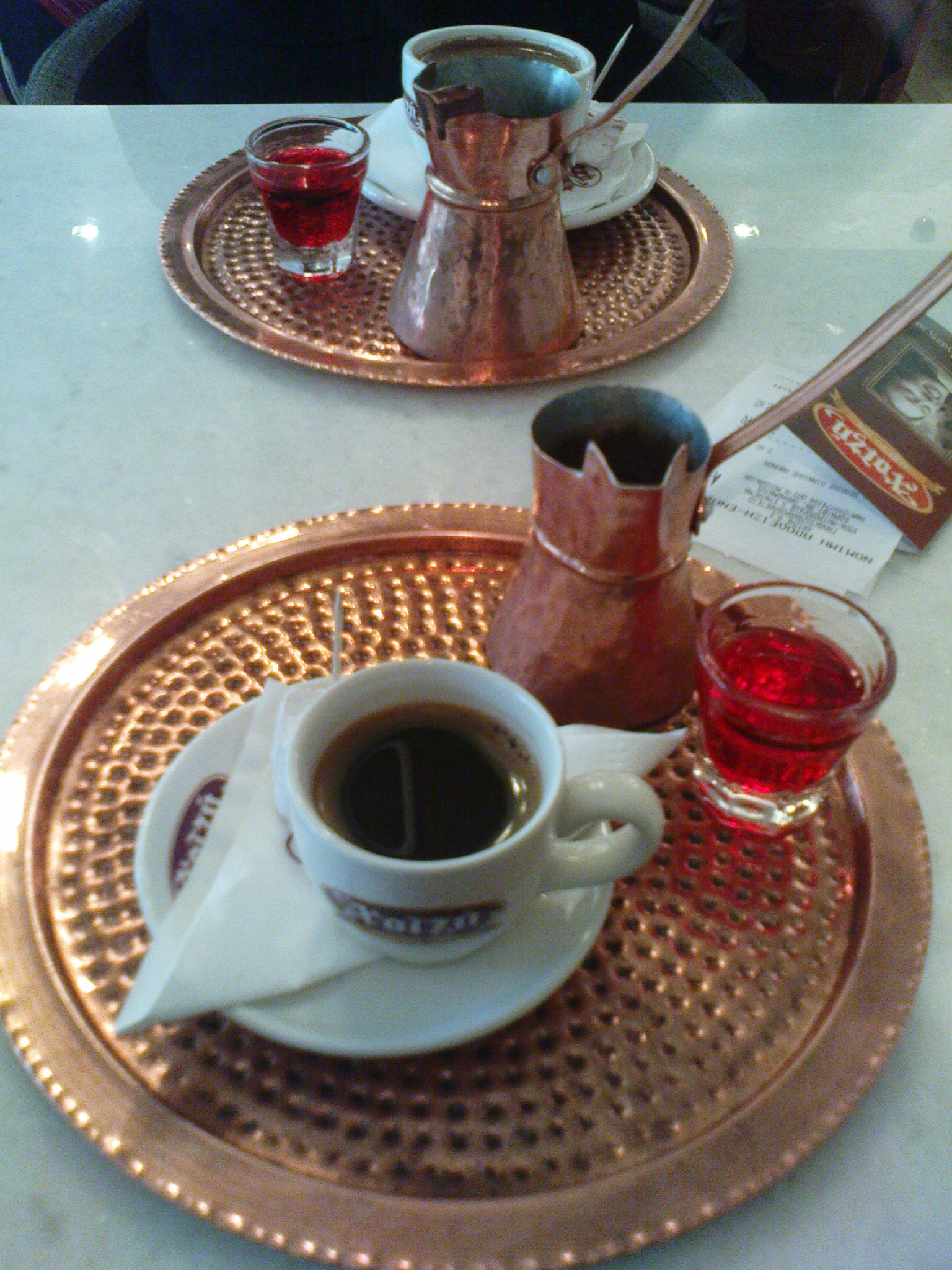 Café grec presentat en un briki (μπρίκι) tradicional i acompanyat de licor de roses, a una cafeteria d'Atenes.